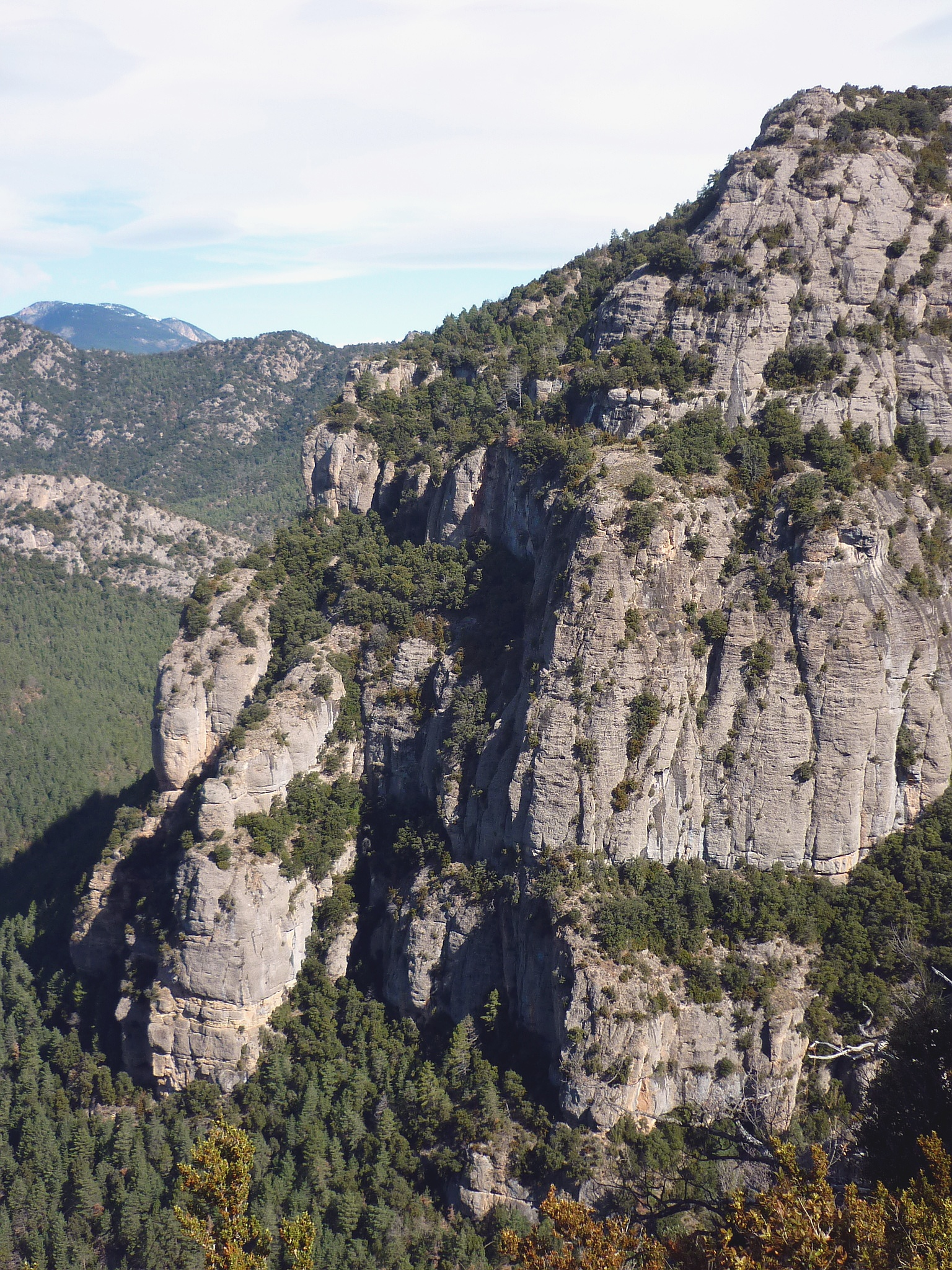 l'Amorrador, a l'extrem ponentí del Serrat de la Questió (Muntanyes de Travil), sobre la Valldora i a la dreta de la Rasa de les Fraus de Vilella. Navès (Solsonès - Catalunya)